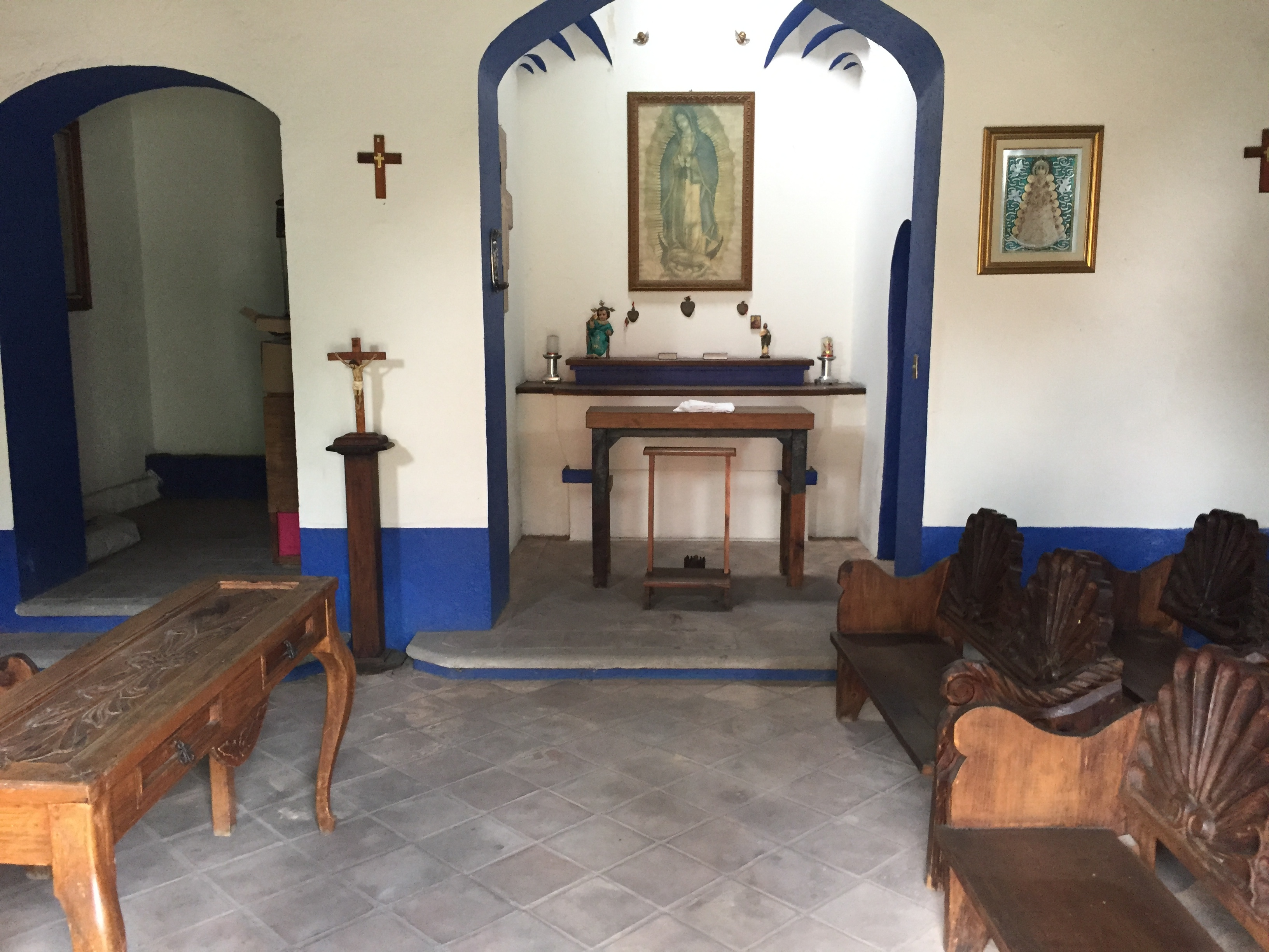 Altar principal dentro del Oratorio de Amaxalco dedicado a la Virgen de Guadalupe. Ahí, se encuentran bancas talladas de madera y un reclinatorio individual